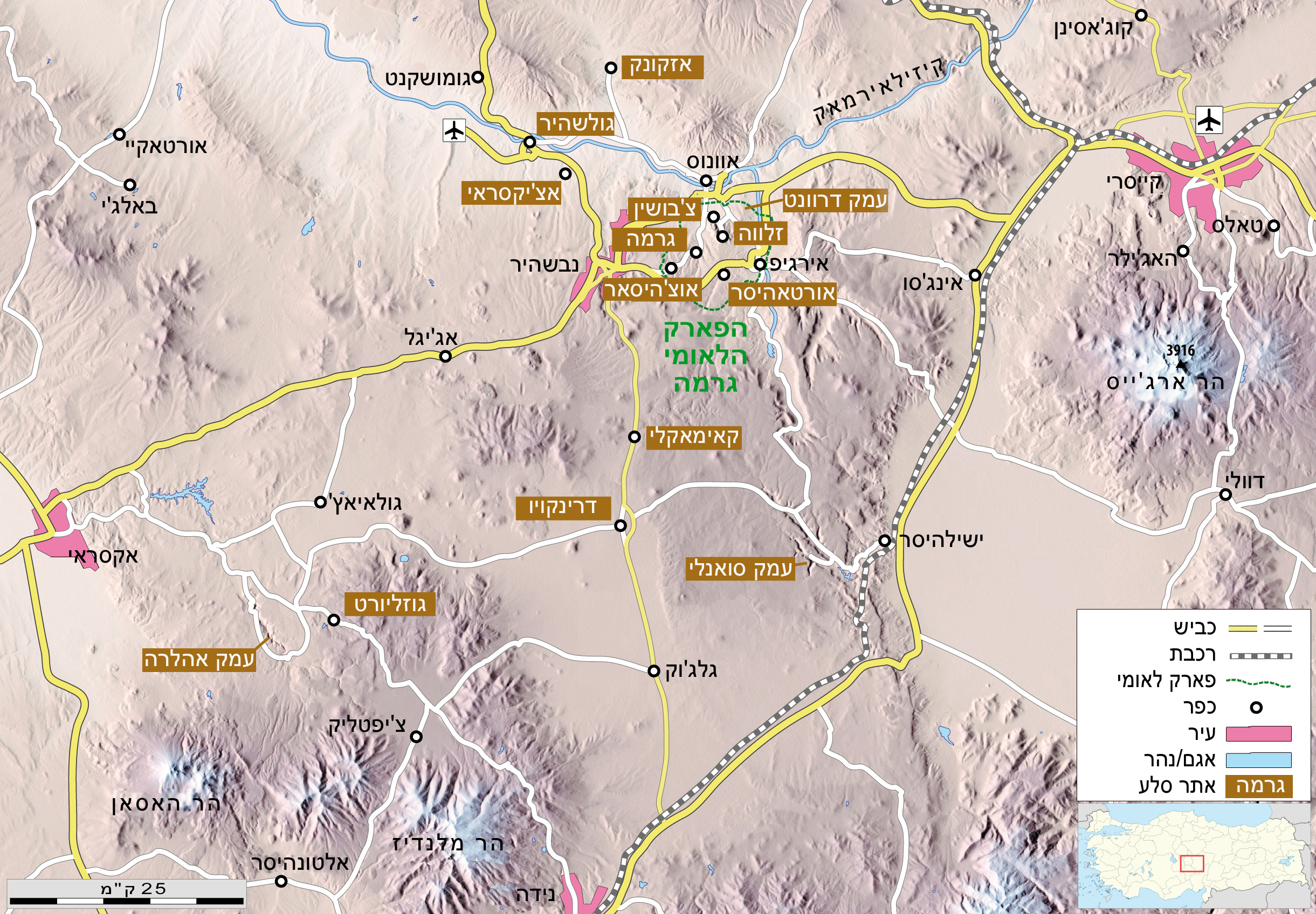 מפת קפדוקיה